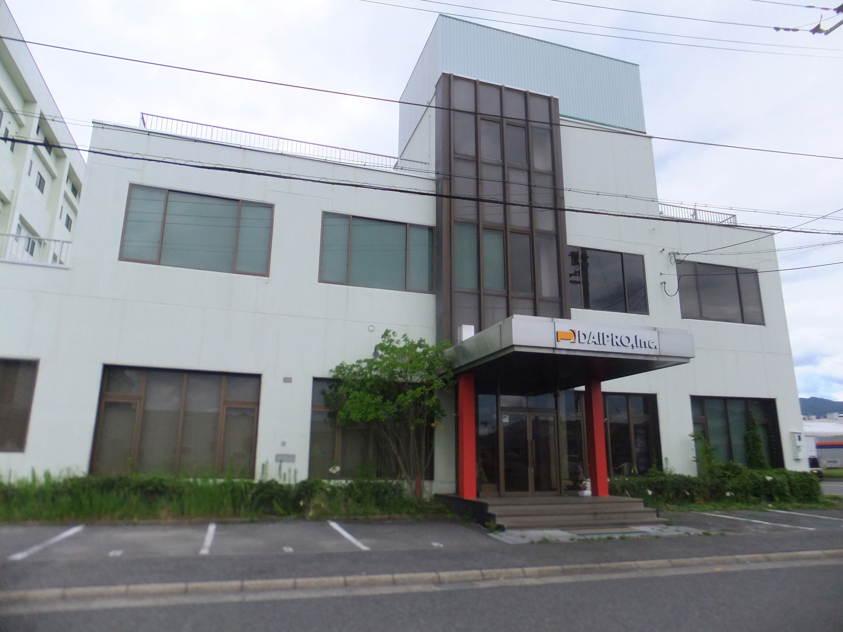 株式会社だいすけプロダクション本社